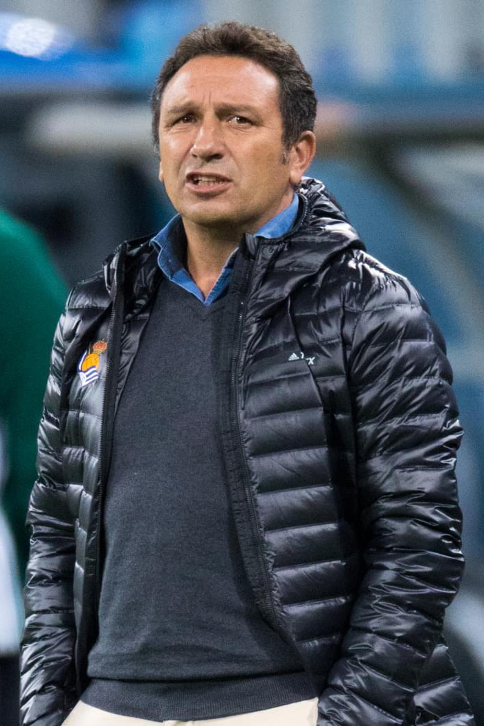 28.09.2017. Россия, Санкт-Петербург, стадион «Санкт-Петербург». Лига Европы УЕФА 2017/18, «Зенит» — «Реал Сосьедад».